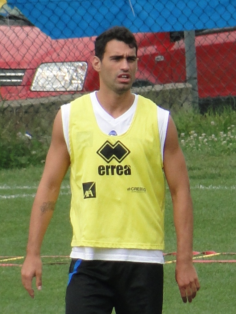 Davide Brivio, calciatore italiano